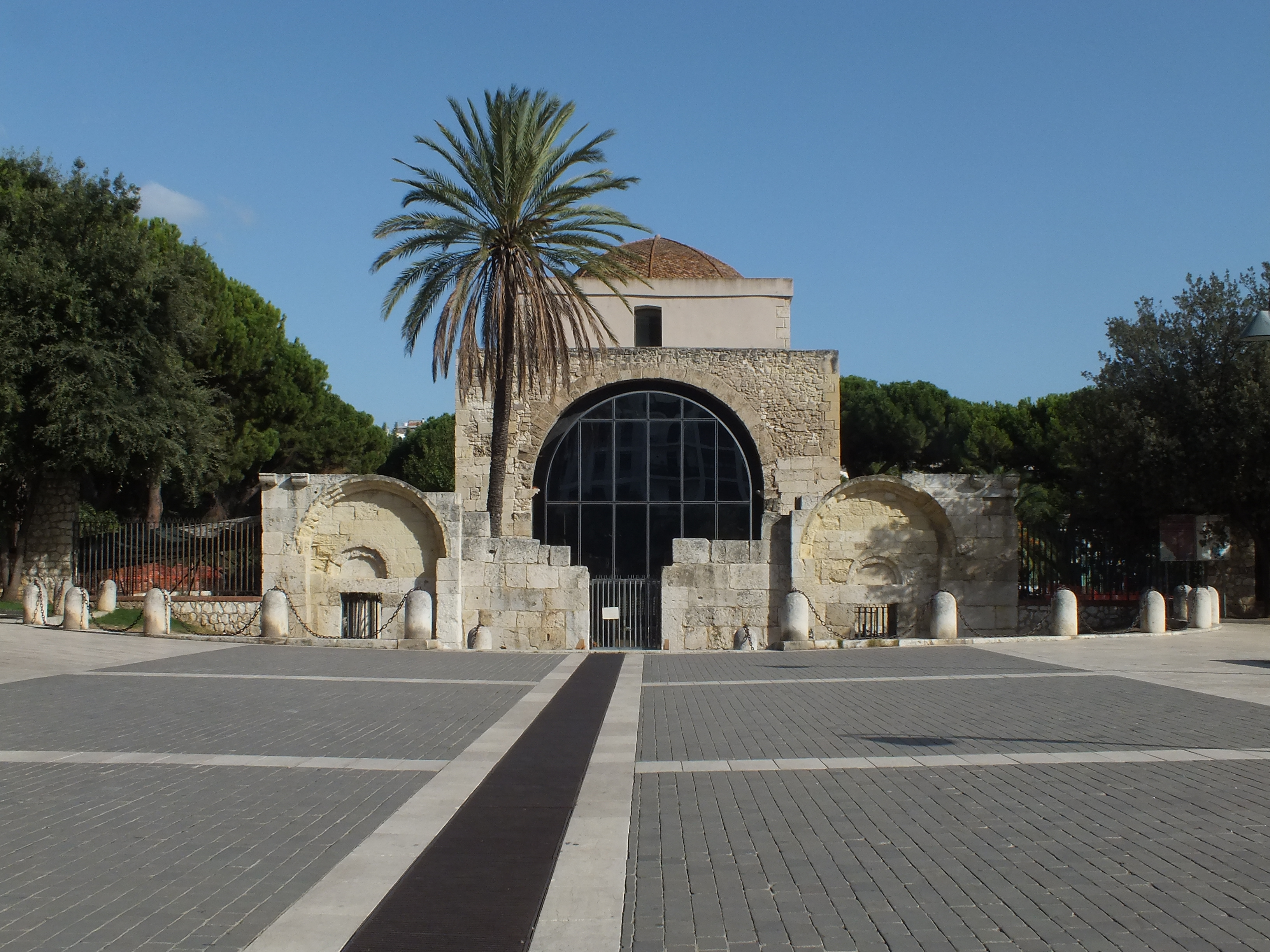 Basilica di San Saturnino - 092009546-MIBAC This is a photo of a monument which is part of cultural heritage of Italy.